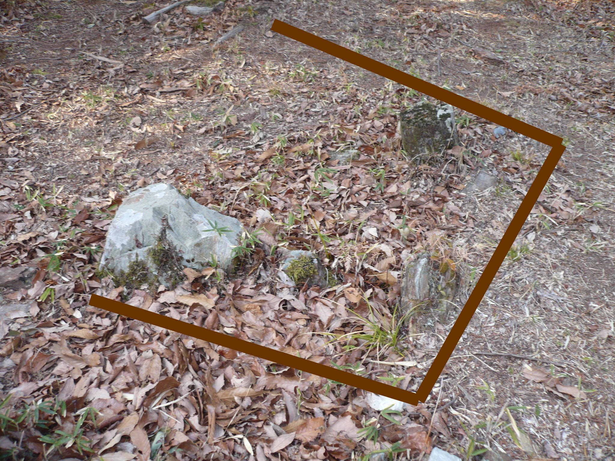 釜床跡